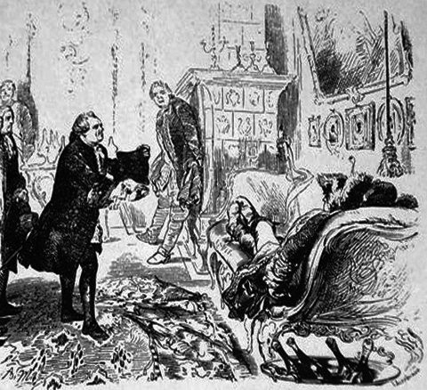 Berlin, 1760: Der Kaufmann Gotzkowsky bittet den auf dem Sofa liegenden russischen Befehlshaber (Tottleben?) um Schonung der Stadt Berlin